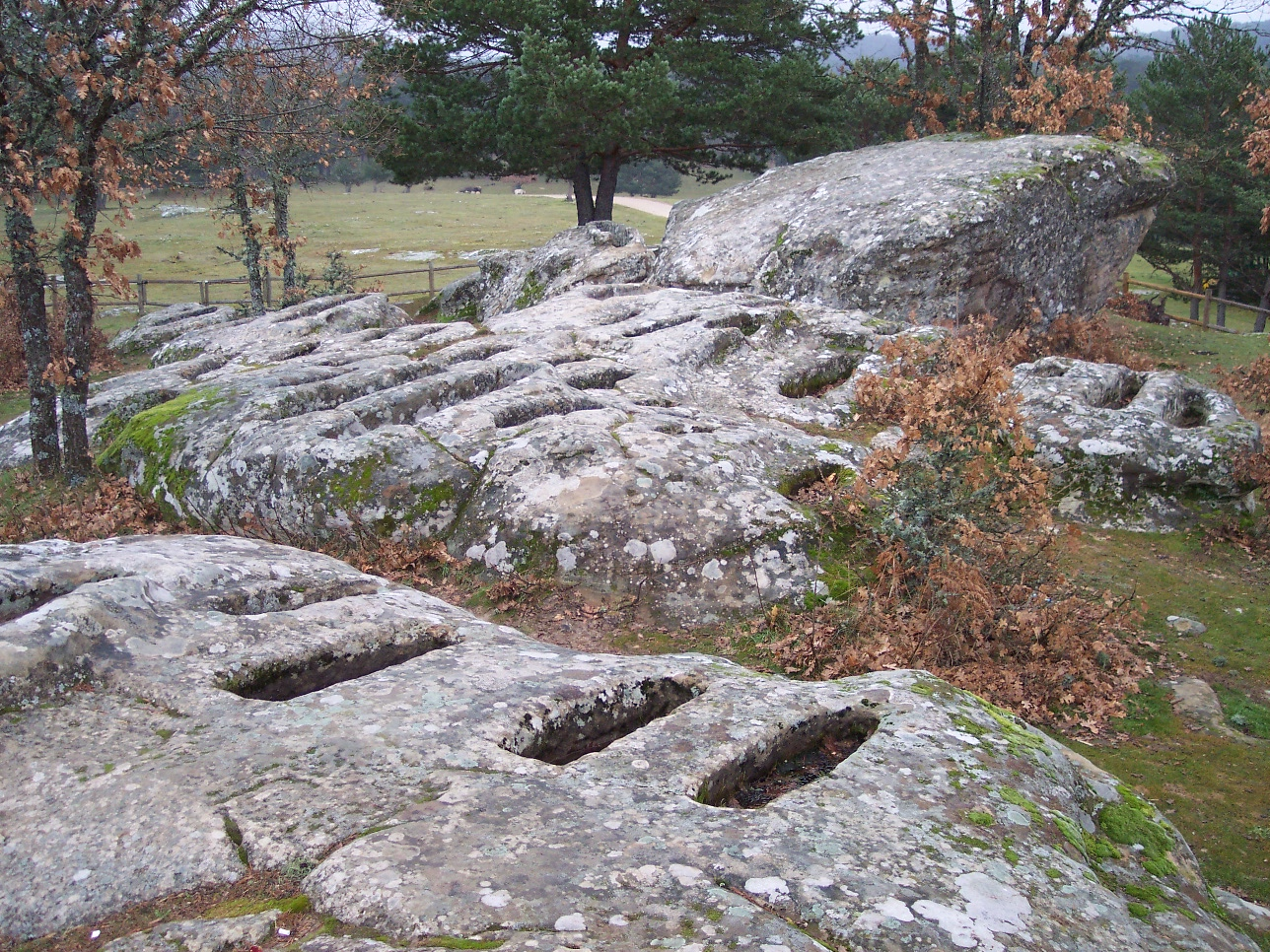 Vista parcial de la necrópolis de Revenga